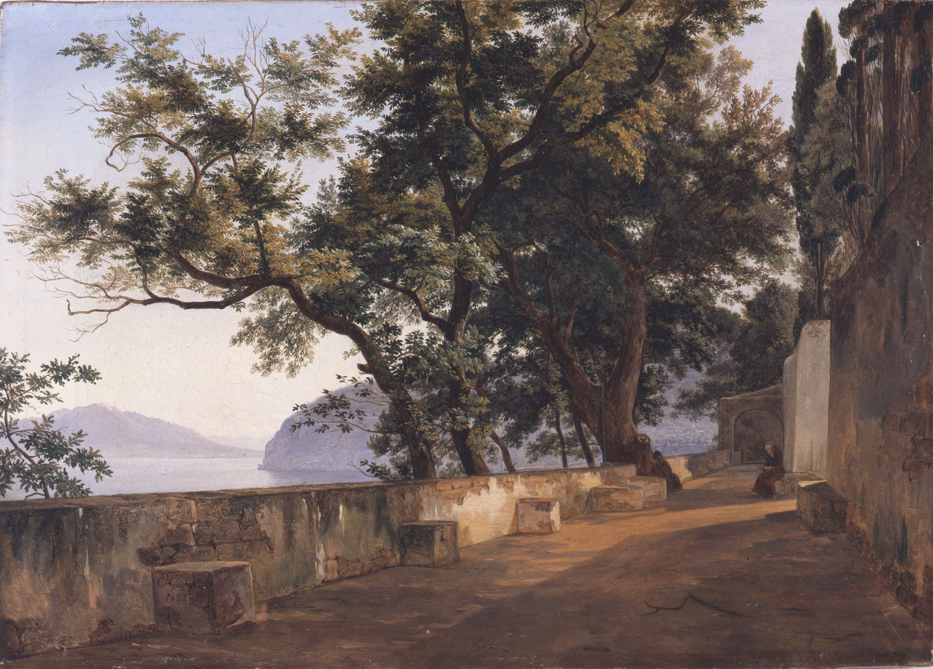 Garten der Kapuziner bei Sorrent. Bezeichnet: C.Götzloff 1827